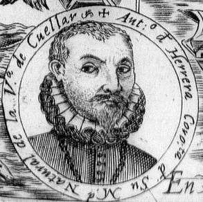 Retrato de Antonio de Herrera y Tordesillas, Cronista Mayor del Rey, y de las Indias, natural de Cuéllar